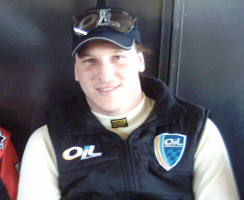 Guido Falaschi, piloto argentino de automovilismo de velocidad, nacido el 1º de octubre de 1989 y fallecido el 13 de noviembre de 2011